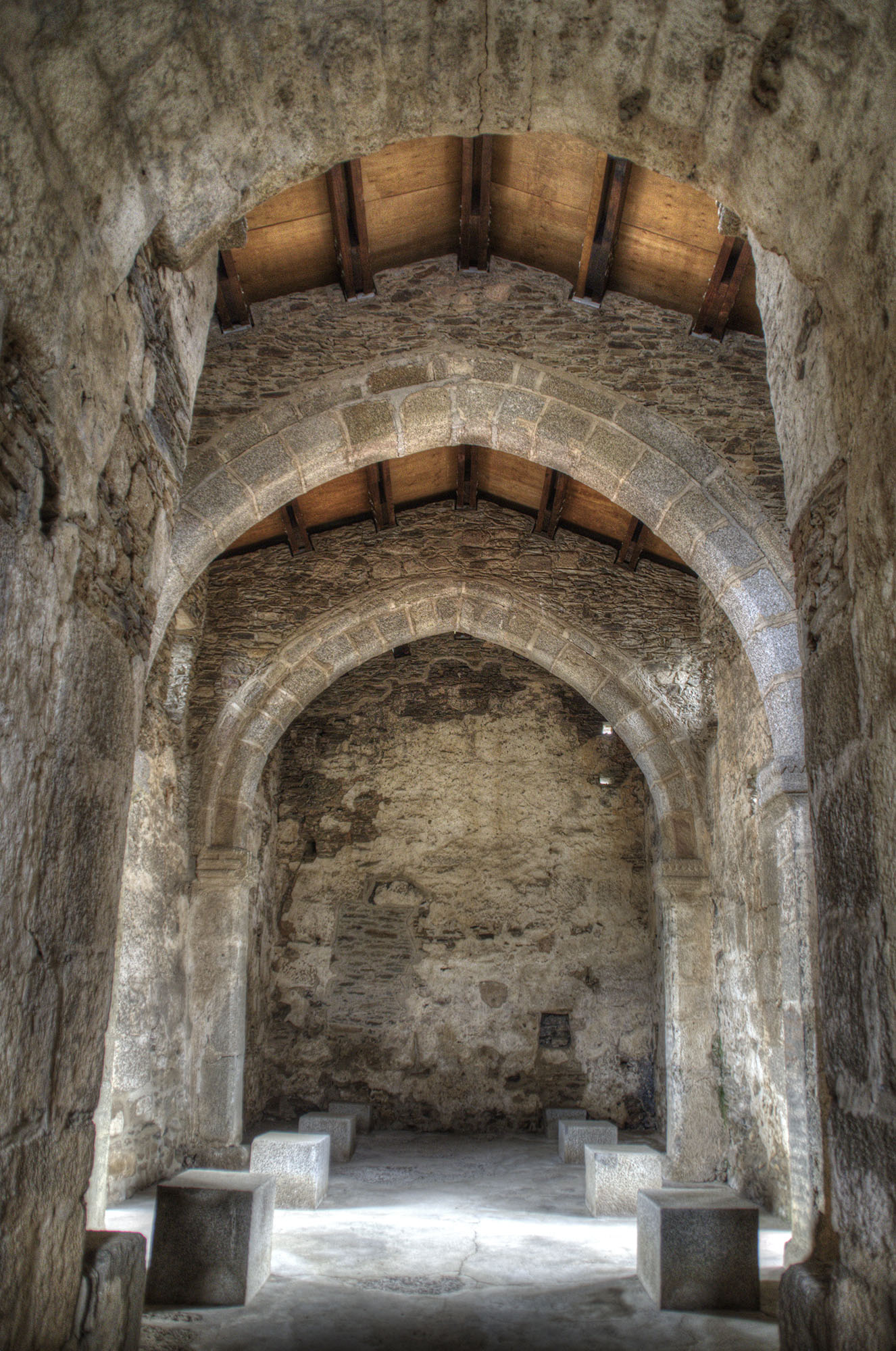 Nave